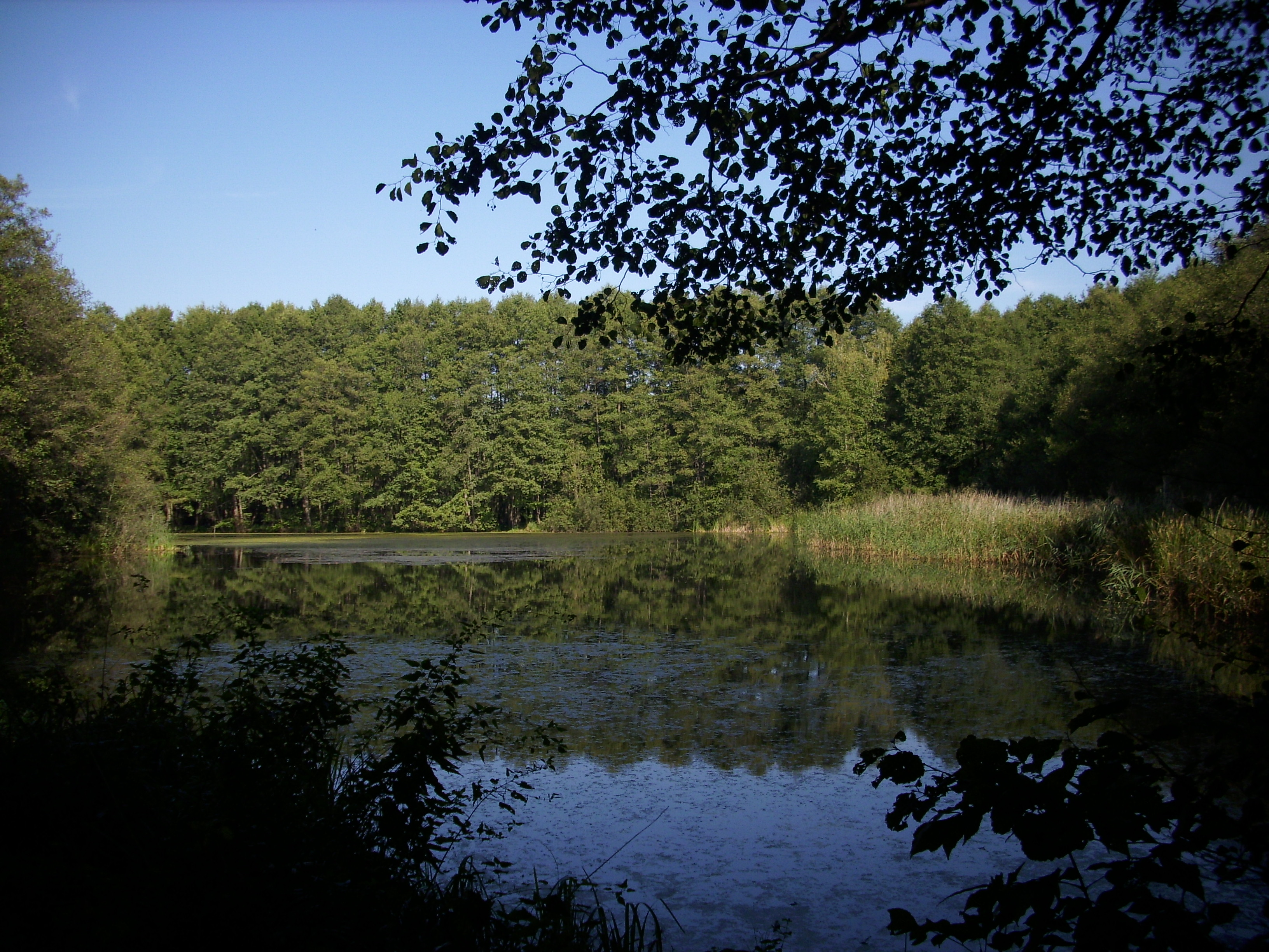 Zülowseen bei Rangsdorf, Brandenburg, Deutschland